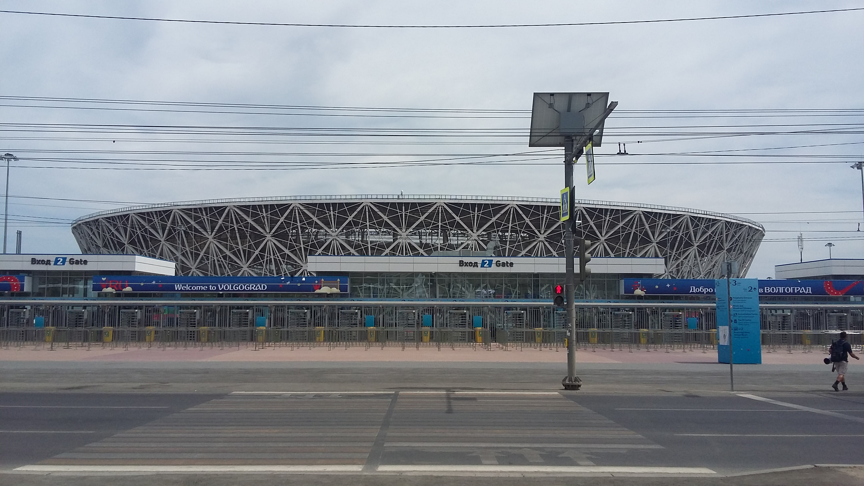 Волгоград Арена 24 июня 2018